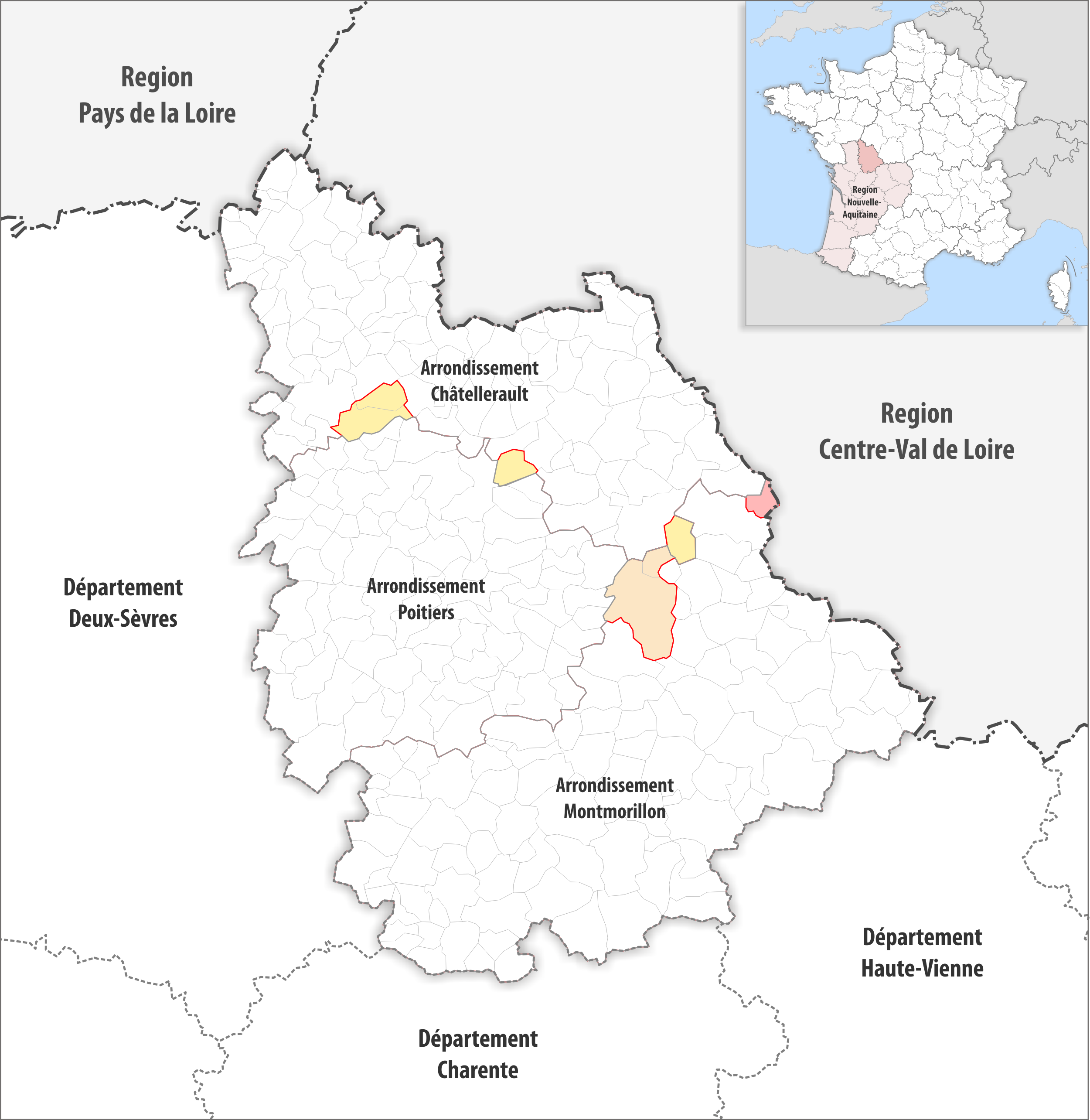 Arrondissements Anpassungen auf 2017 im Departement Vienne